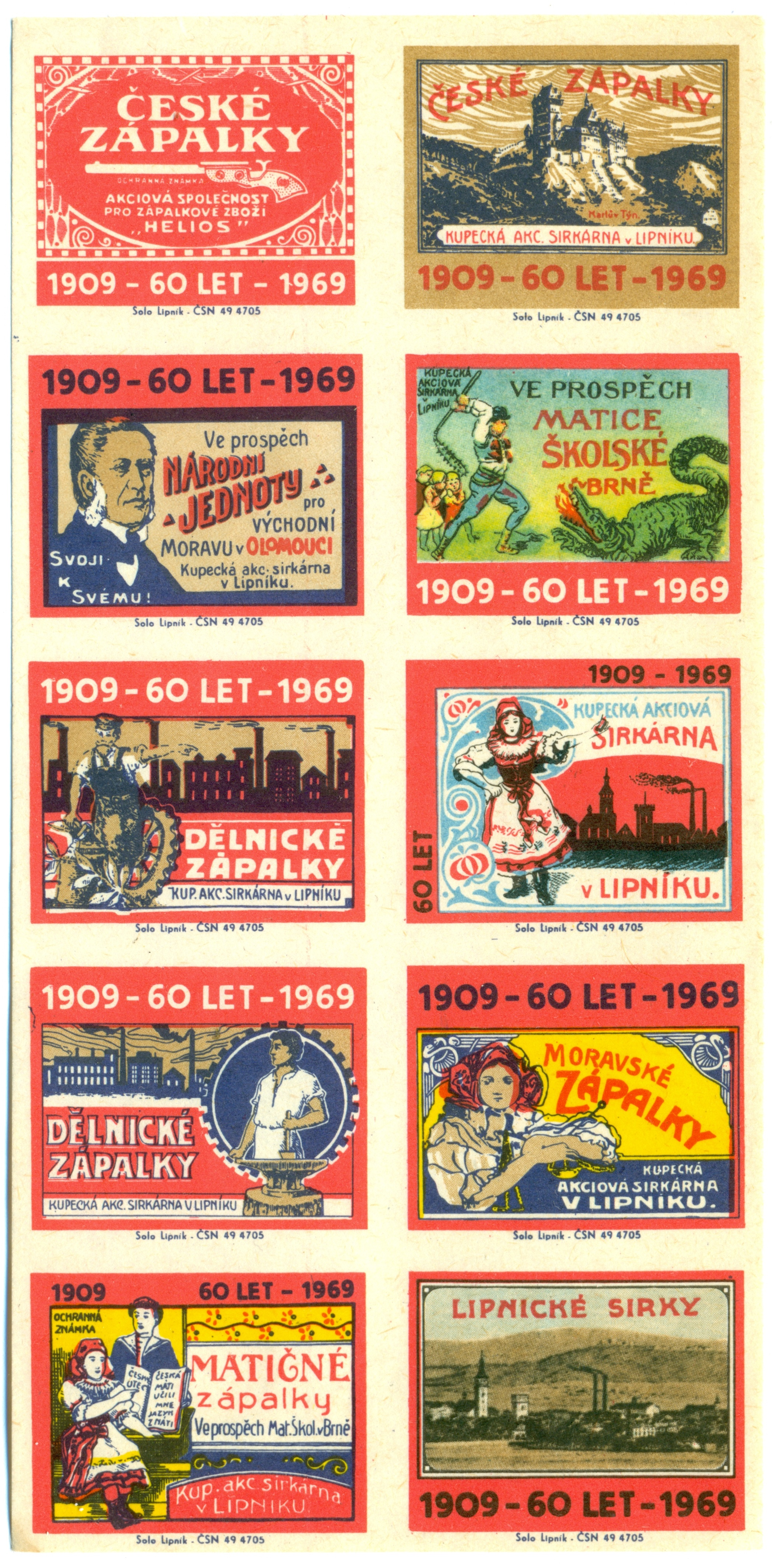 nálepka z roku 1969